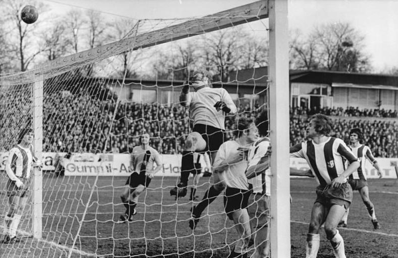 ADN-ZB-Häßler-27.3.76-str-Dresden: Fußball-Oberliga SG Dynamo Dresden - 1. FC Magdeburg 2: 0-Mit Mühe kann Magdeburgs Torwart Dorenburg (m.) den Ball noch über die Latte lenken.Gerd Heidler (3.v.r.) kam nicht an den Ball heran, nachdem Hans-Jürgen Kreische (2.v.l.-beide Dresden) scharf auf das Tor geschossen hatte.